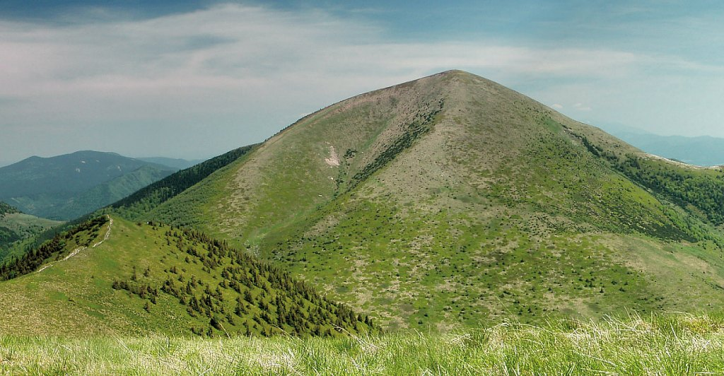 Malá Fatra, Stoh z Poludňového Grúňa